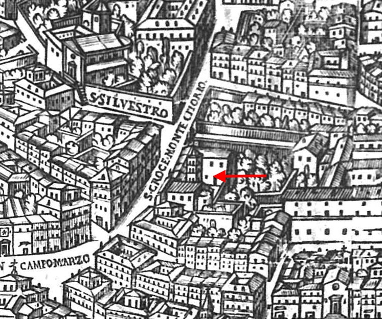 Pianta di Maggi 1625